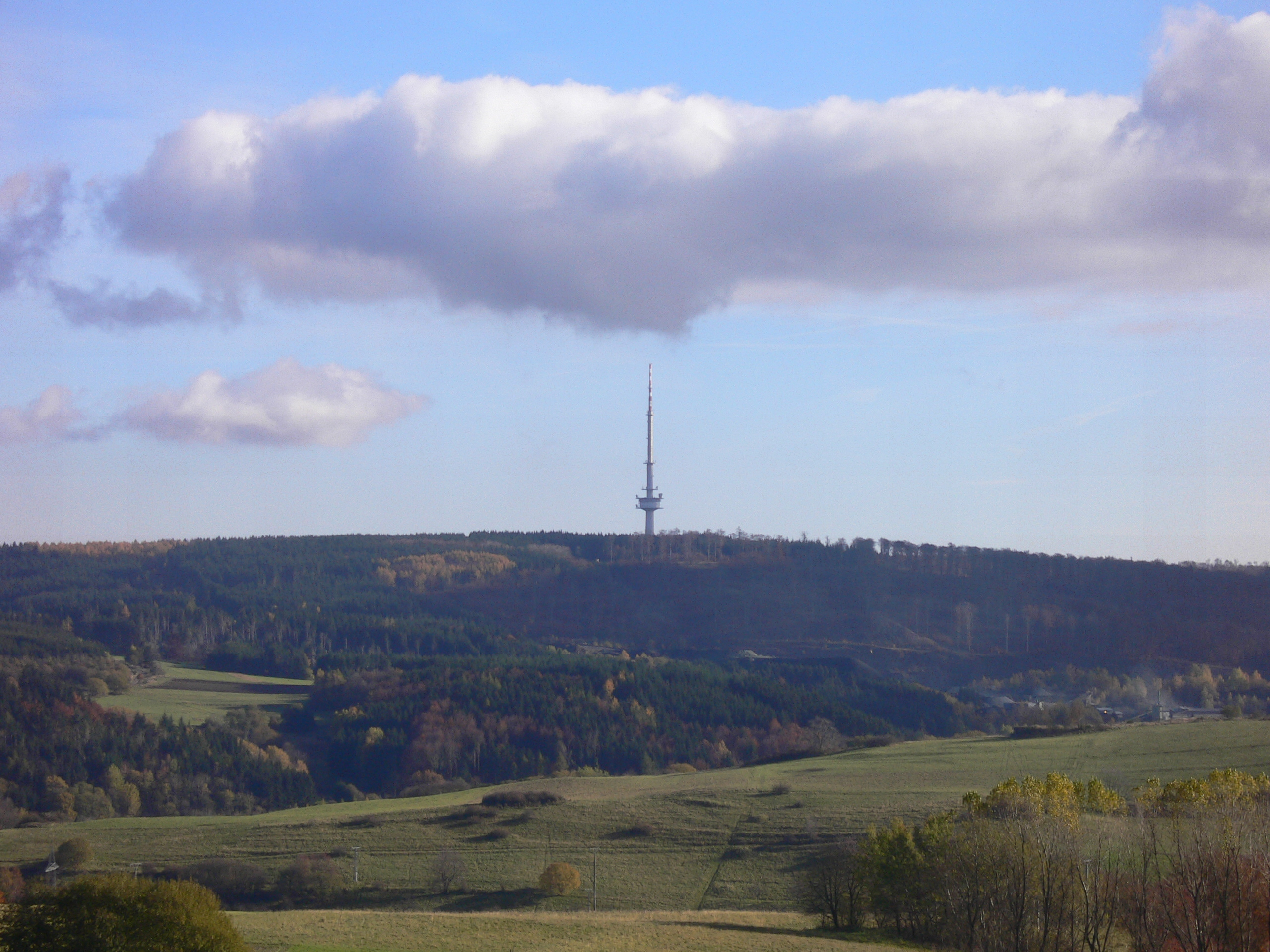 Angelburg mit Sender aus Nord-West gesehen